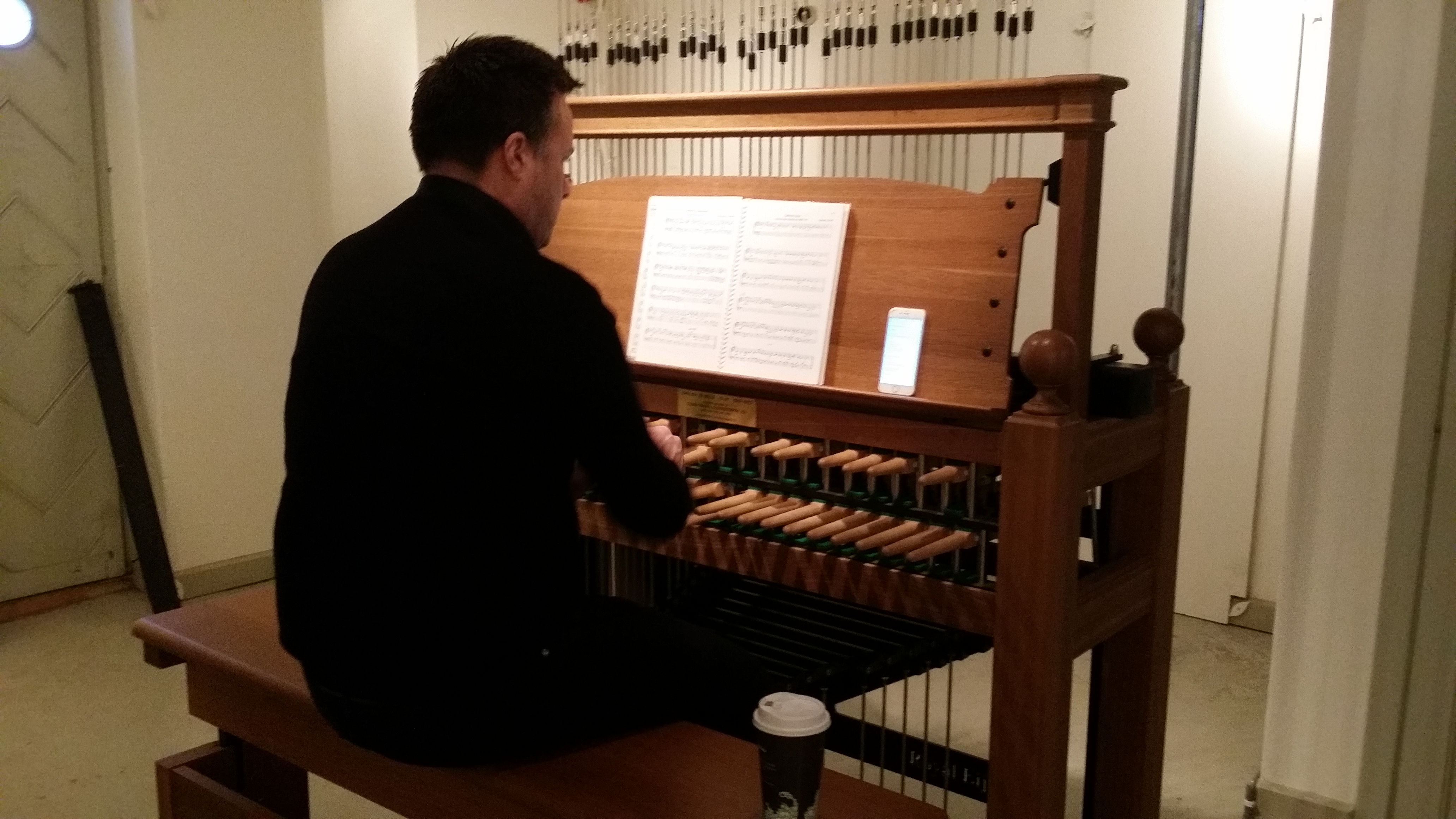 Klokkenist Vegar Sandholt spiller på klaviaturet i Bærum Rådhus